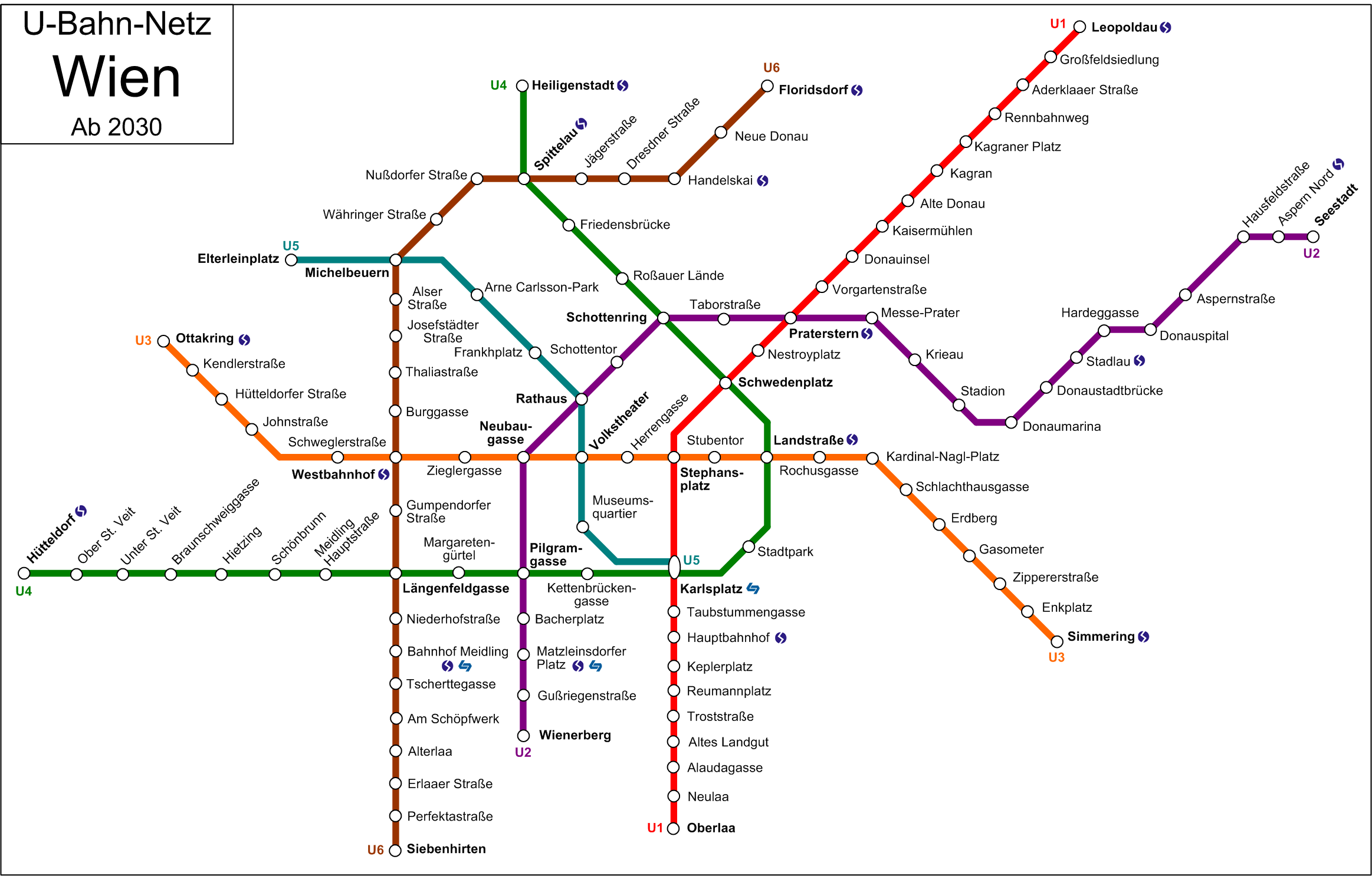 Netzplan Wiener U-Bahn 2030